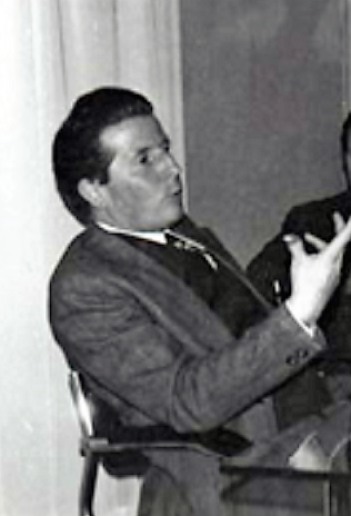 Dino Pieraccioni